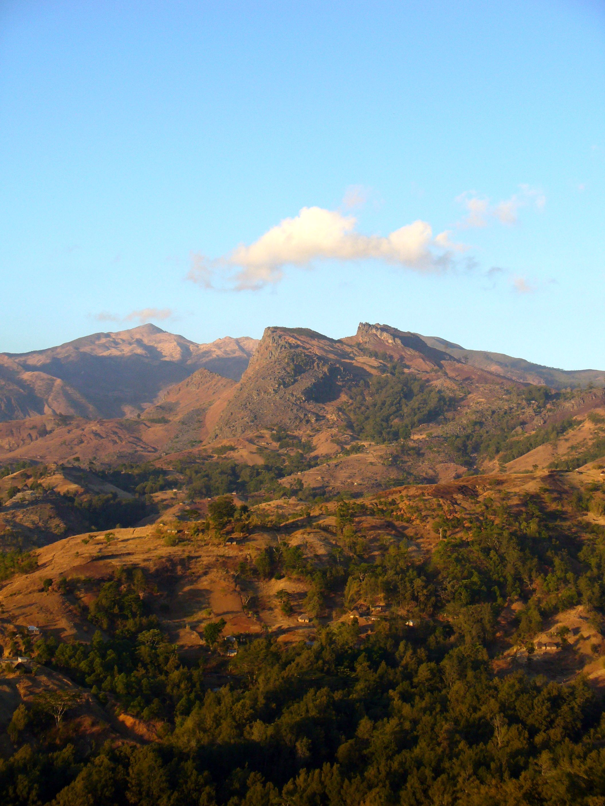 Maubisse, East Timor